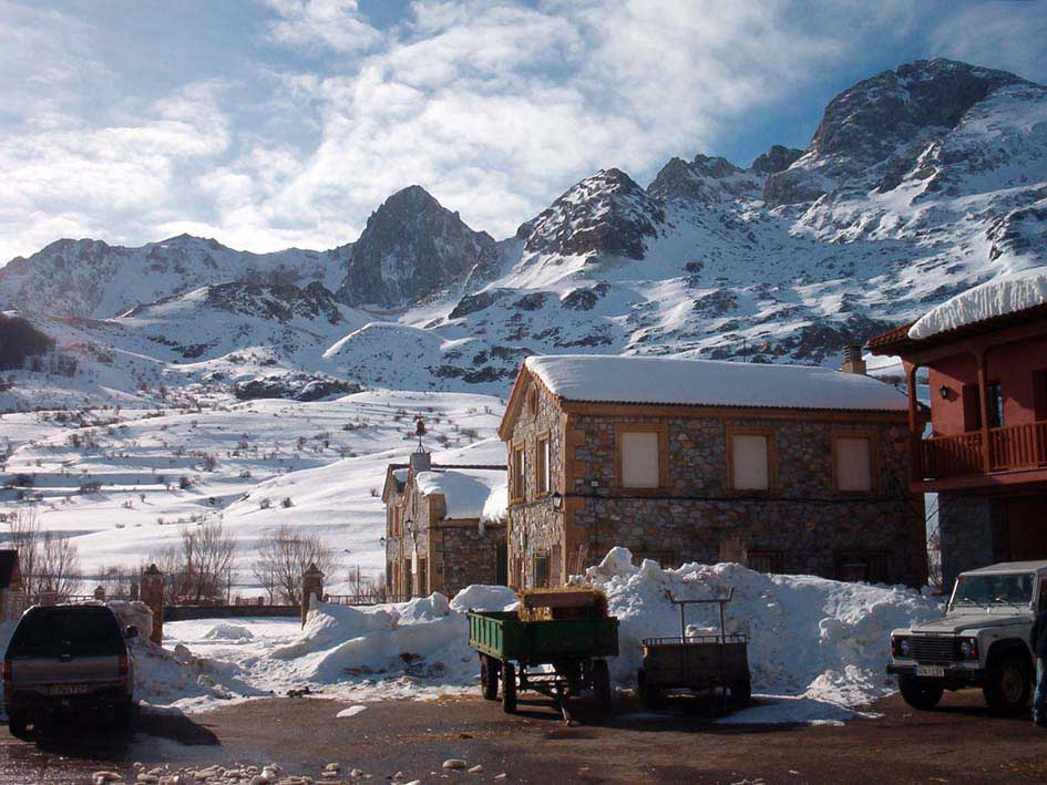 Invernal de Maraña